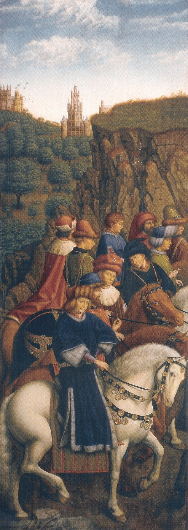 detail: Just Judgesstolen panel reproduction